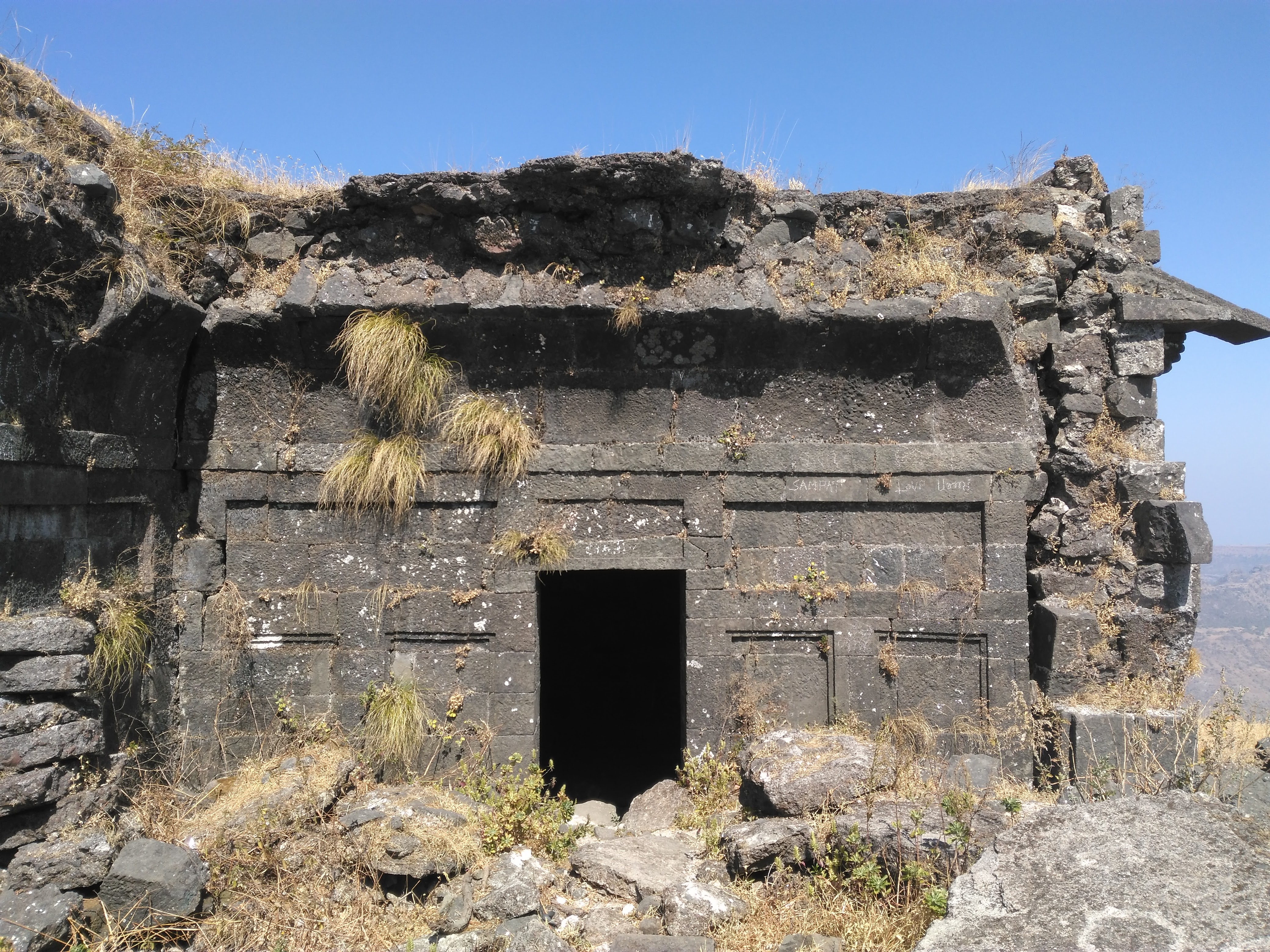 धोडप किल्ला भग्नावशेष